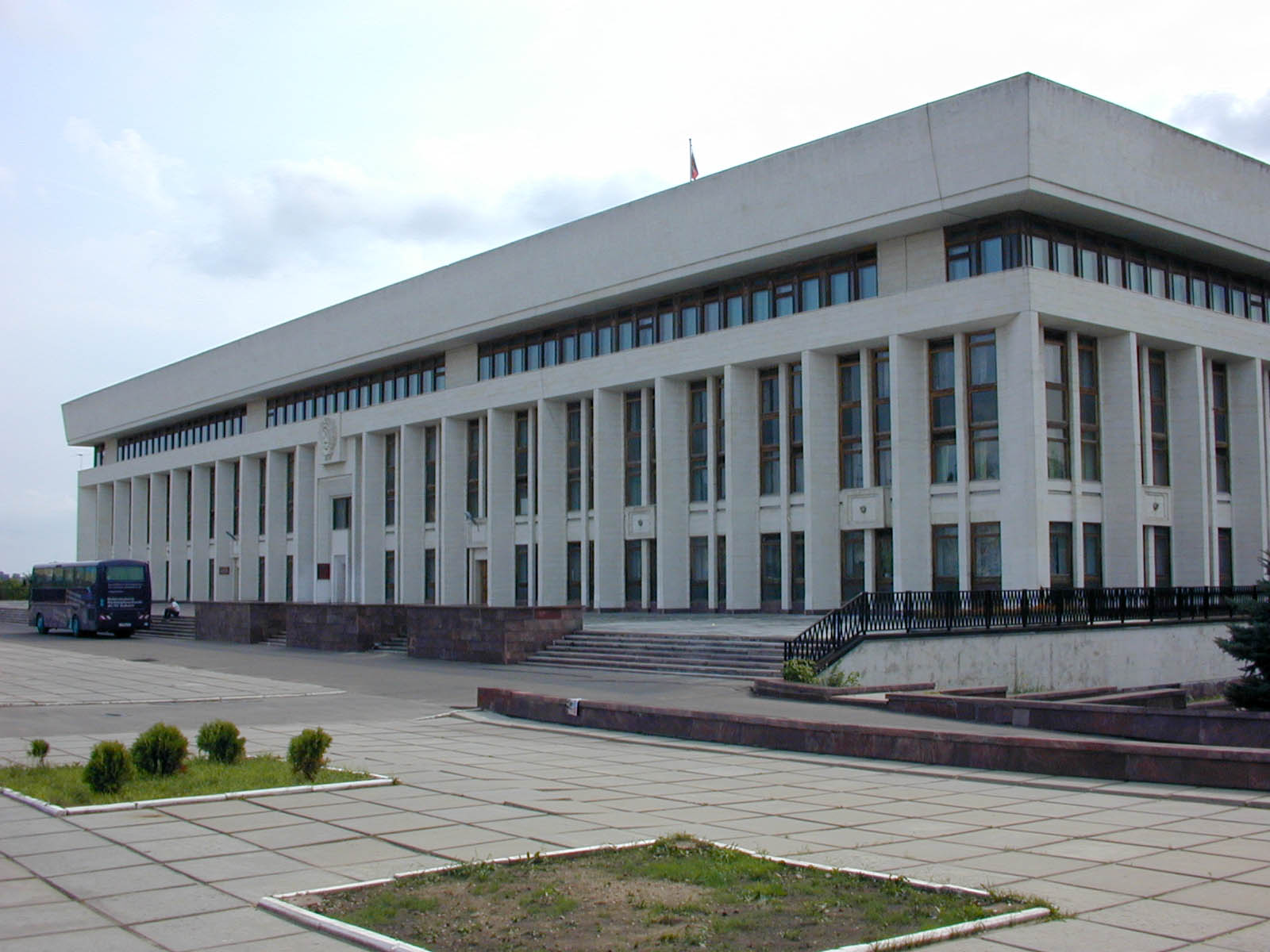 Kaluga region (Kaluga oblast) administration. Kaluga, Russia.